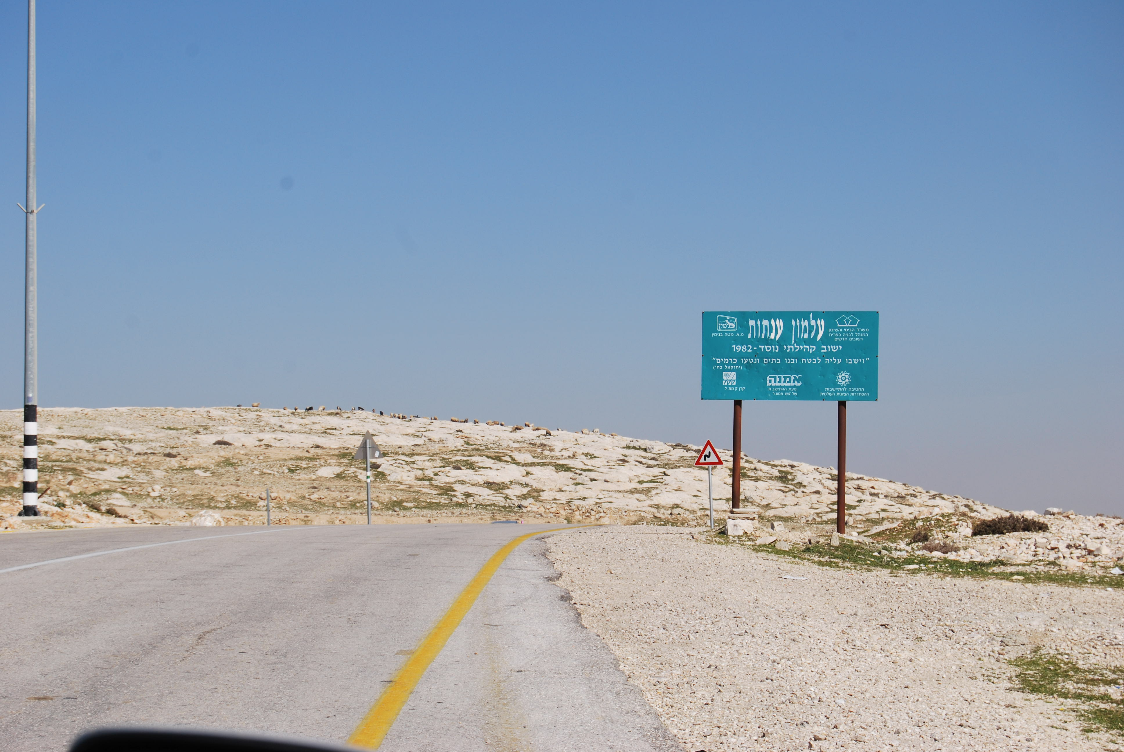 שלט בכניסה להתנחלות עלמון-ענתות